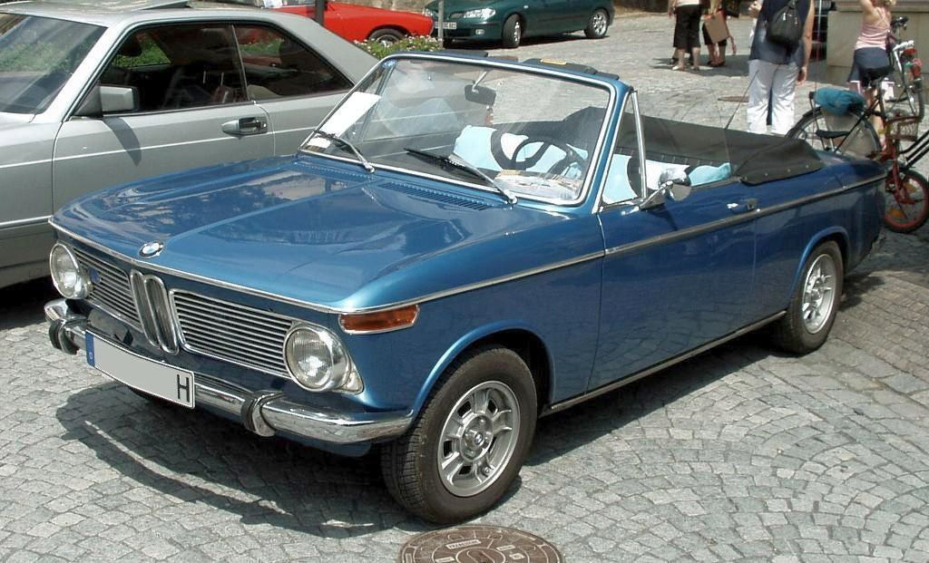 BMW E114 Cabrio